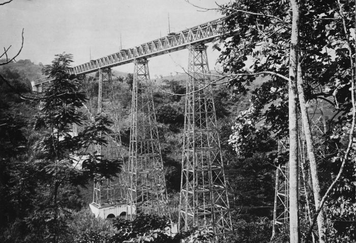 Foto. IJzeren spoorbrug in de Preanger